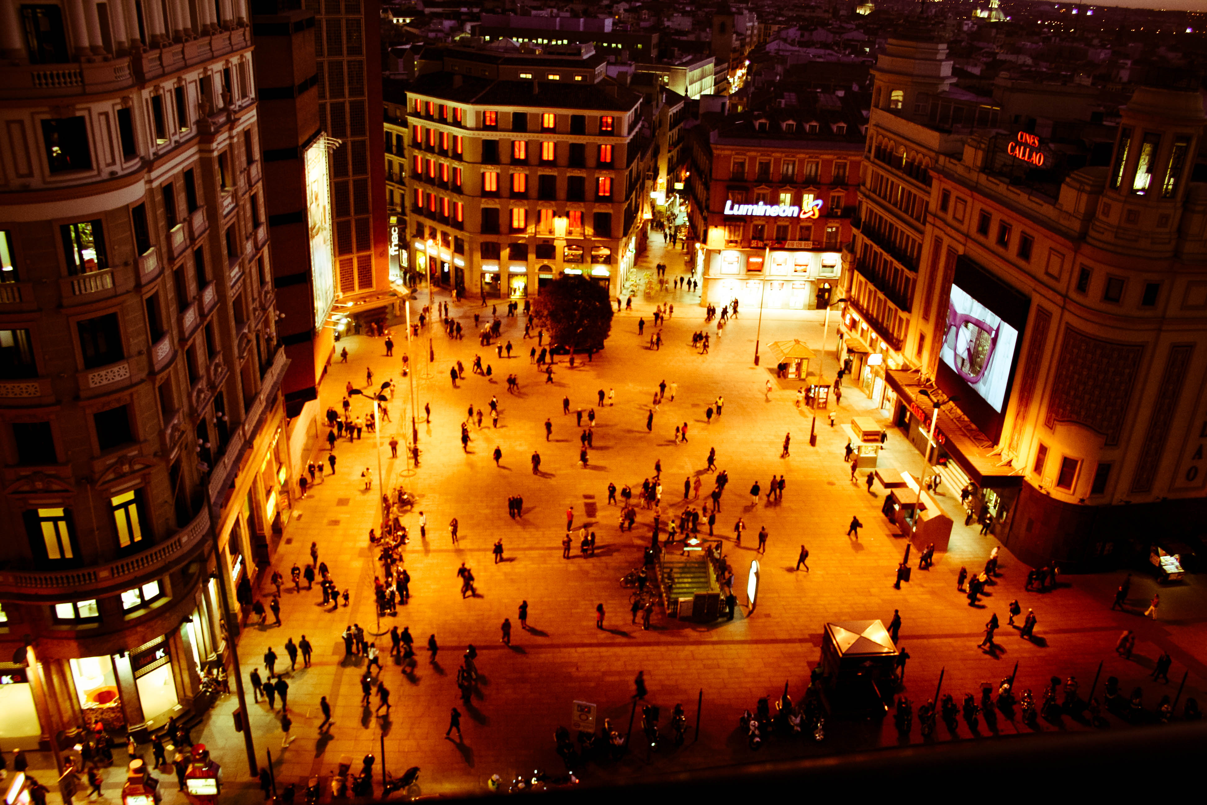 Callau at night